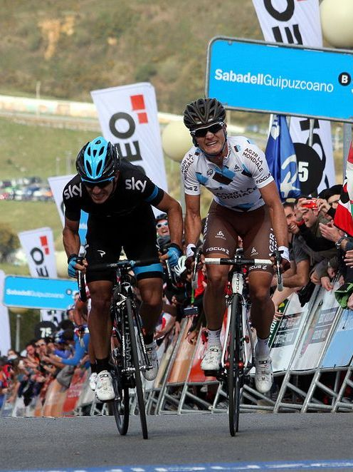 Final de la 3ª etapa. Sergio Henao se impone a Carlos Betancur